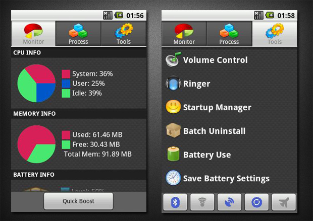 Пример за Memory manager в Android